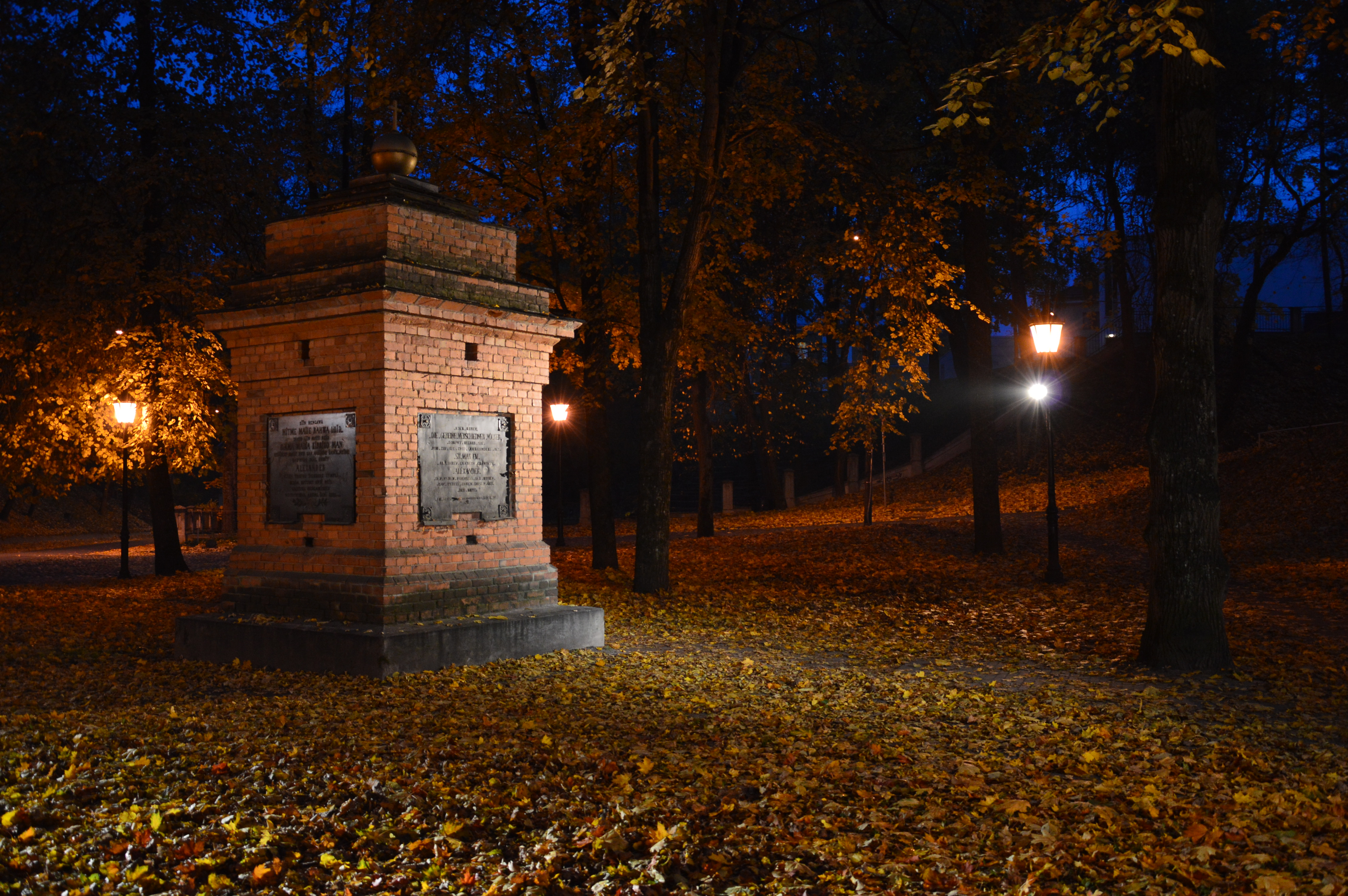 Rahvaste mälestussammas